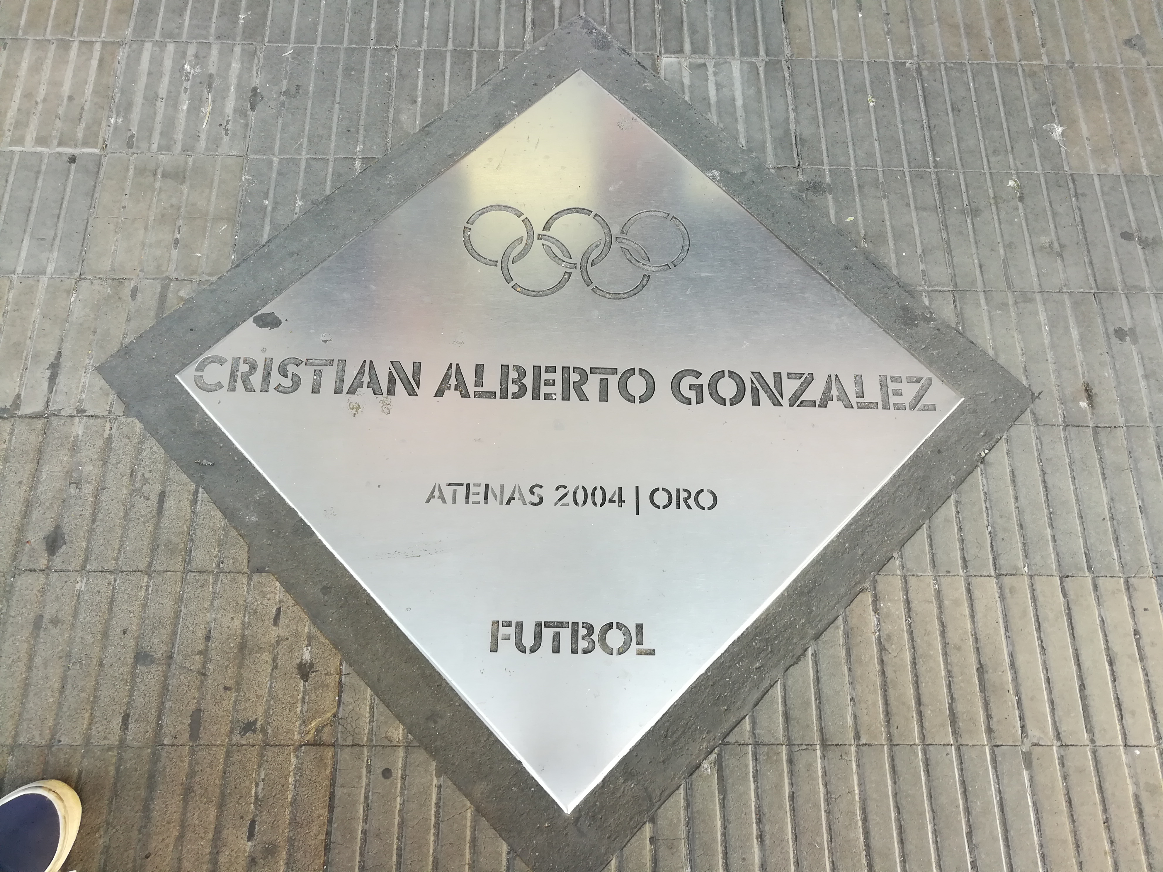 Paseo de los Olímpicos de los en la Avenida Pellegrini (Rosario).